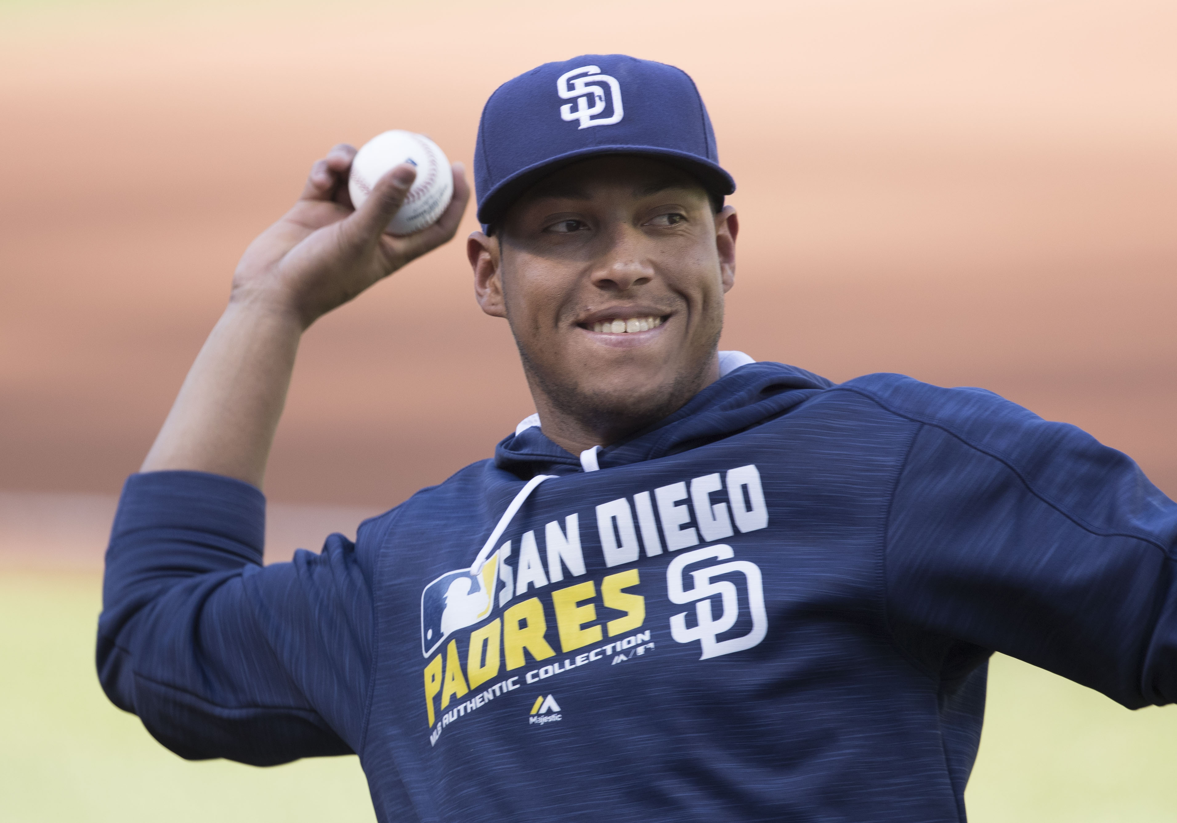 Yangervis Solarte